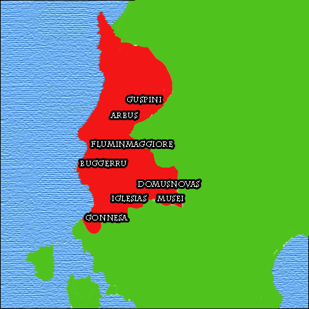 Mappa dell'Iglesiente , fonte: [1]